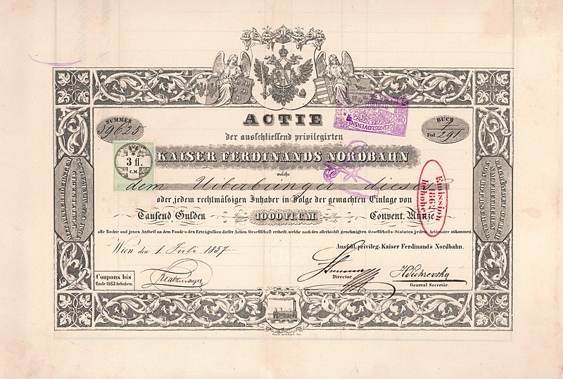 Aktie über 1000 Gulden der Kaiser Ferdinands Nordbahn vom 1. Juli 1857